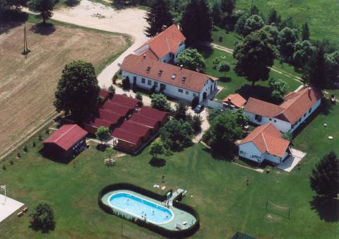 Szentgyörgyvölgy, Hungary, aerialphotography